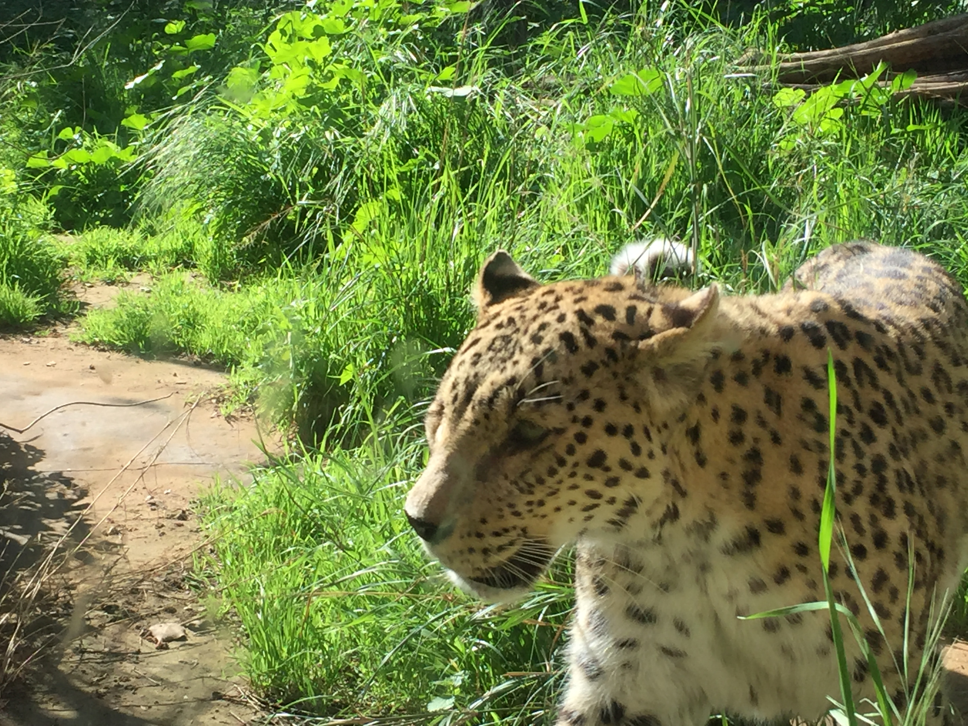 الفهد العربي في حديقة الحيوانات الاسرائيلية في تل-ابيب/رامات غان